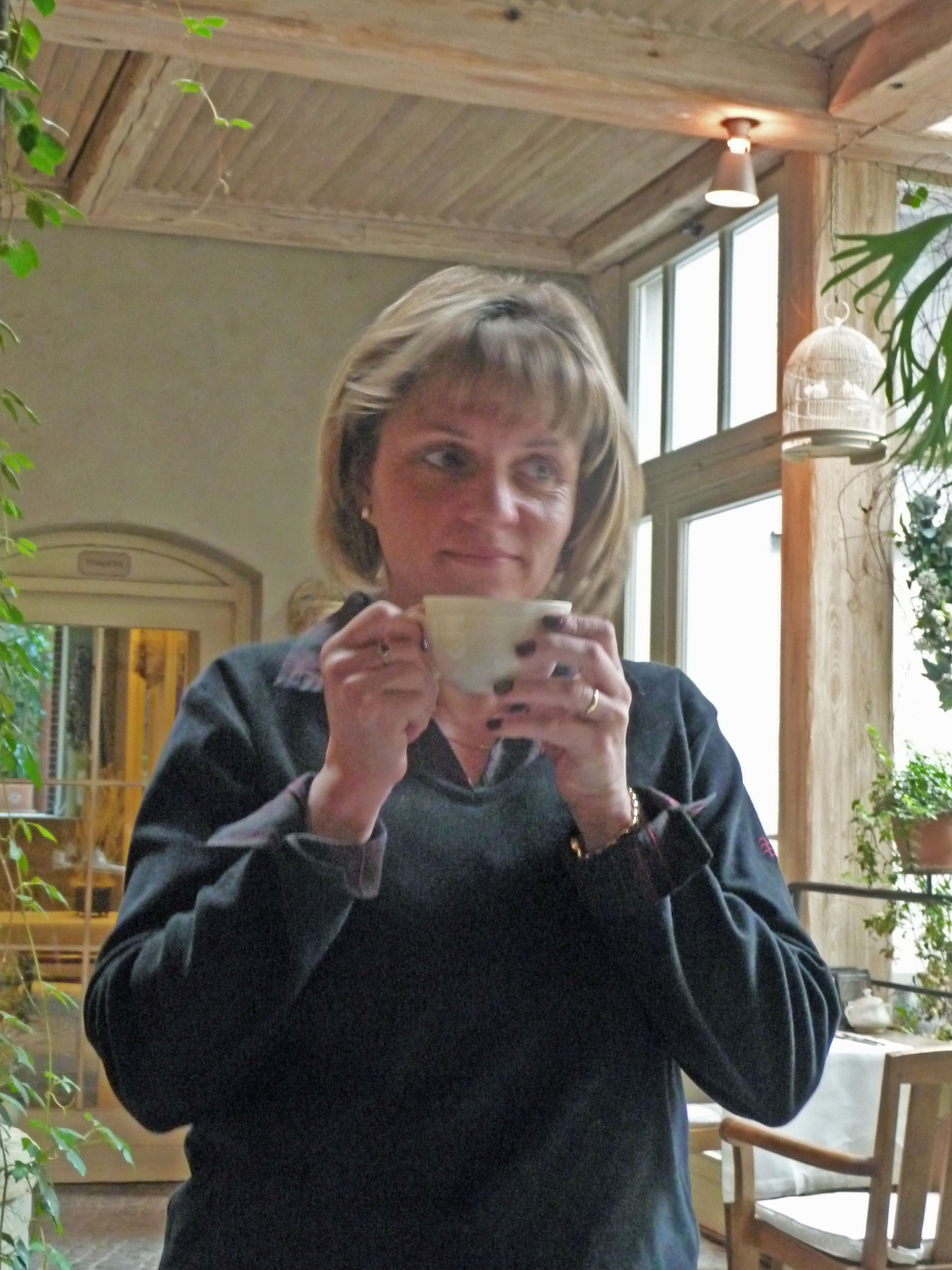 Zdjęcie profesor Elżbiety Wąsik.